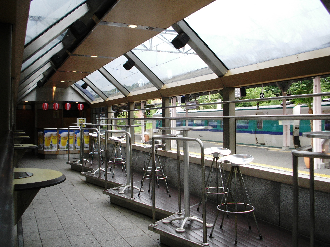 JR西日本オハ25-57車内